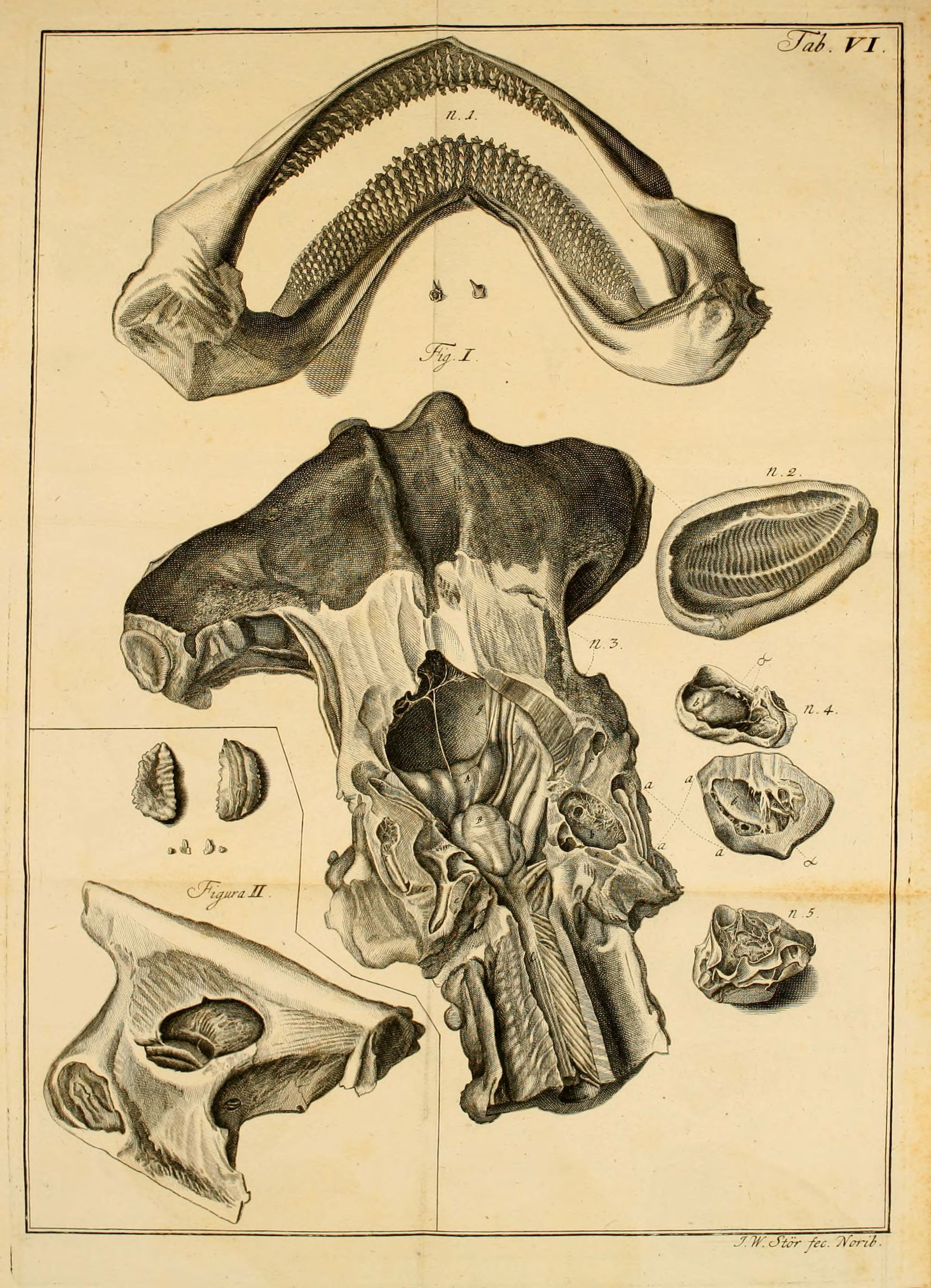 S.TKcftirr fec. Tferii.